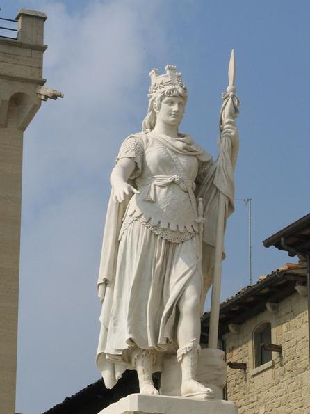 La Statua della Libertà, collocata nel Pianello (o Piazza della Libertà) antistante il Palazzo pubblico di San Marino, scolpita da Stefano Galletti (1833-1905) e donata da Otilia Heyroth Wagener nel 1876.